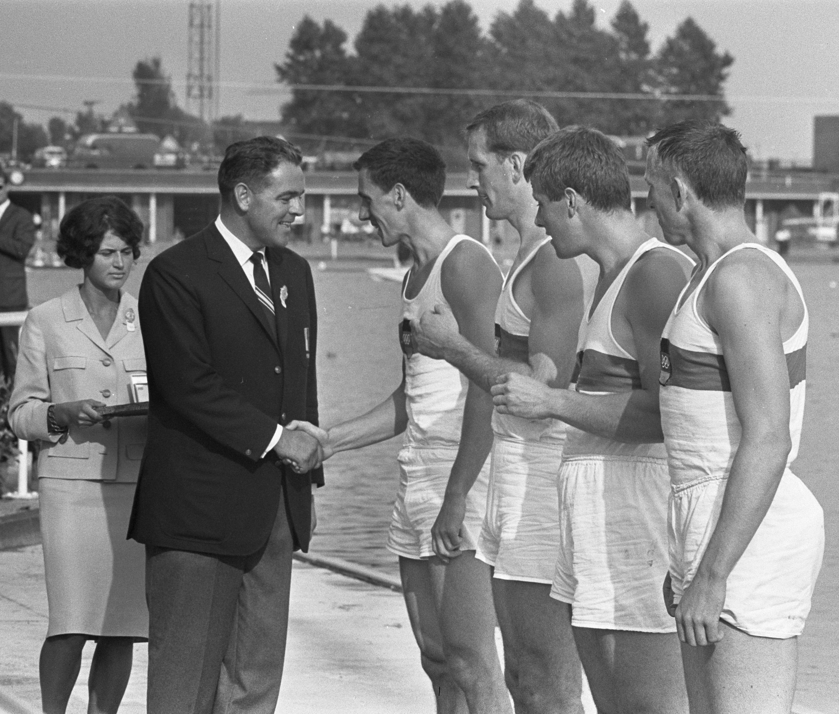 Europese roeikampioenschappen Bosbaan, Duitse vier zonder (ceremonie protocool). ID